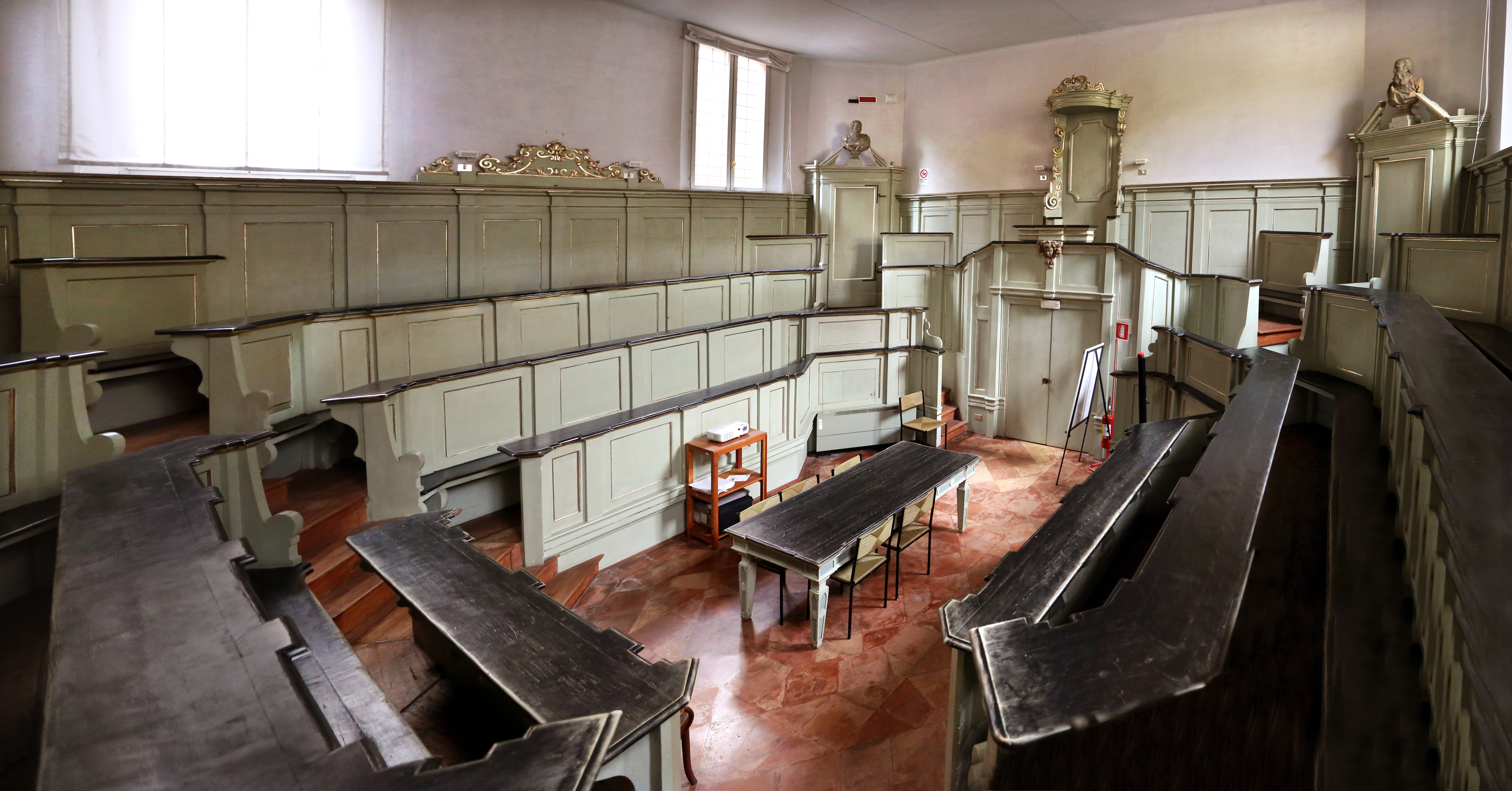 Palazzo Paradiso This is a photo of a monument which is part of cultural heritage of Italy.